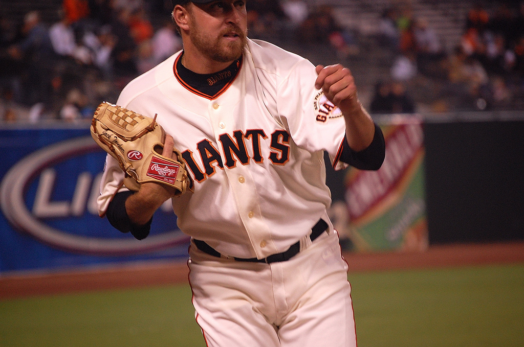 Jack Taschner